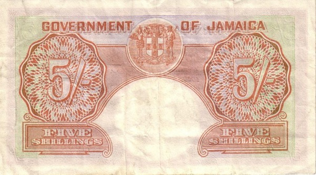 5 shillinges jegy hátoldala.